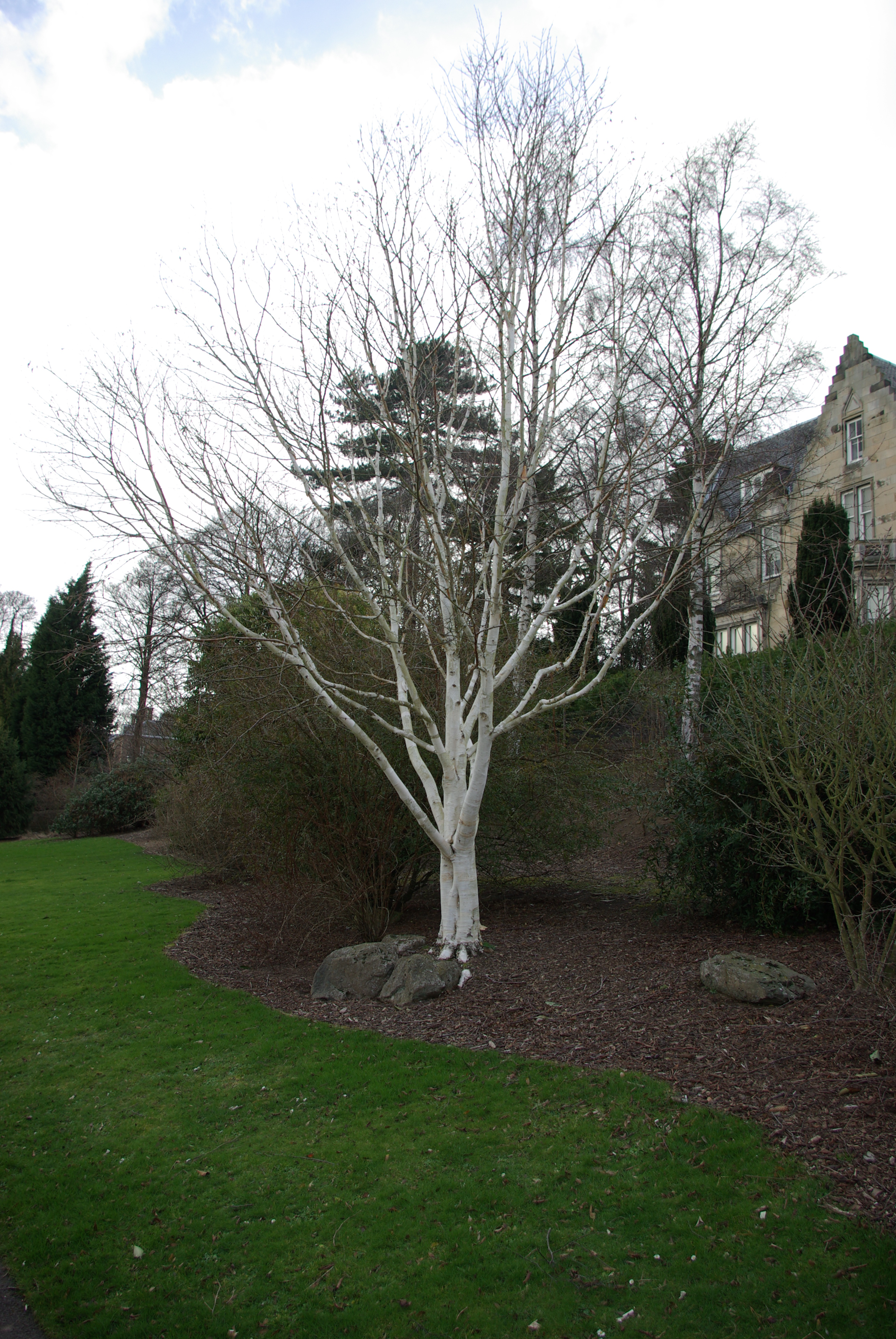 Betula utilis (see also Betula on Wikispecies)